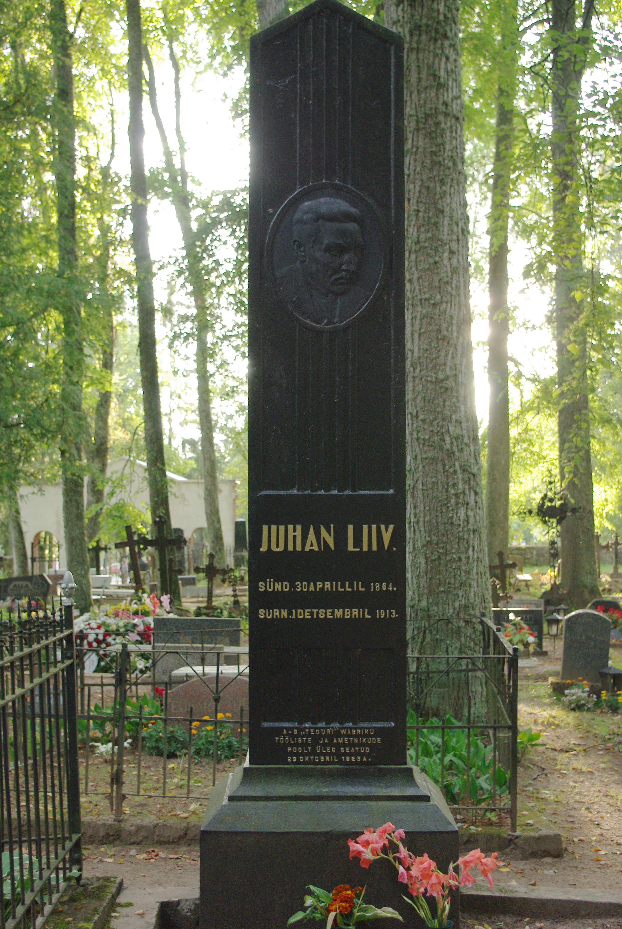 Памятник на могиле Юхана Лийва. Кладбище города Алатскиви.